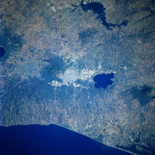 San Salvador seen from space